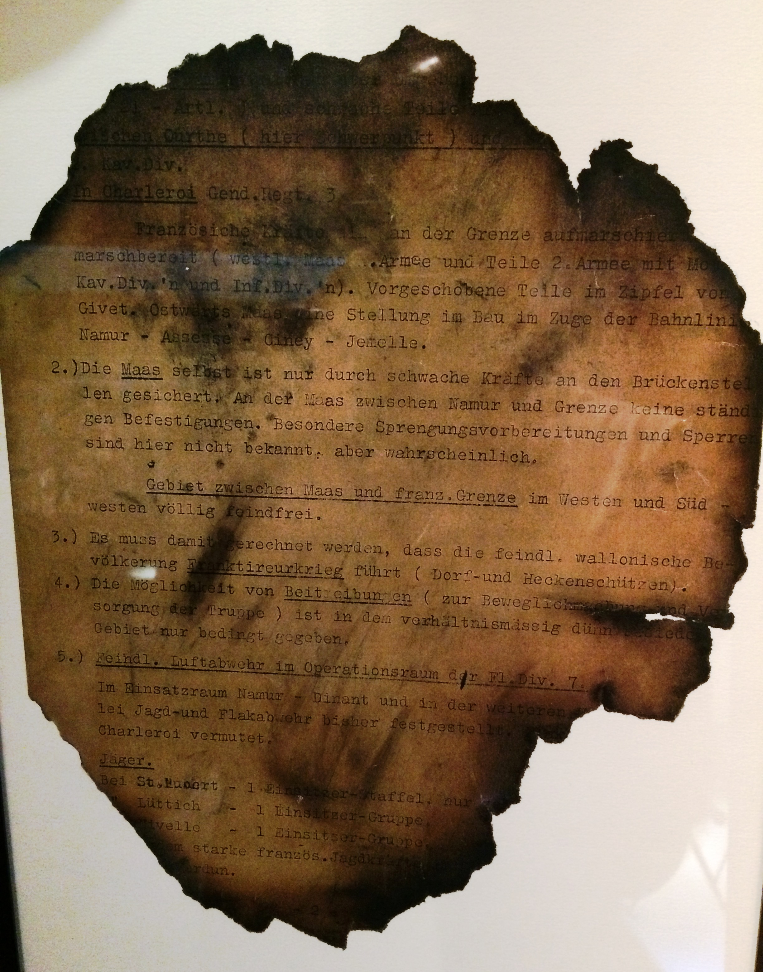 Copia de los planes alemanes de invasión de Bélgica capturados en enero de 1940 a los pasajeros de un avión que fue obligado a posarse en Maasmechelen (Bélgica). Fotografía tomada en el Museo Real del Ejército e Historia Militar de Bruselas.